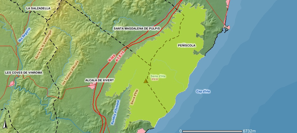 Mapa del parque natural de la Sierra de Irta